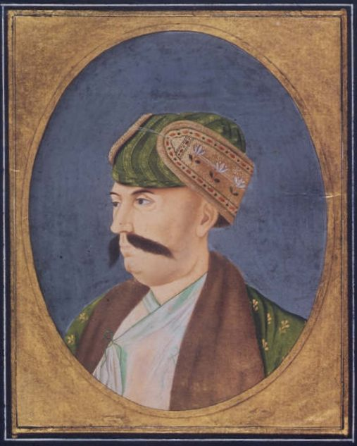 Shuja ud-Daulah